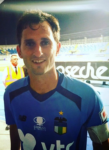 Pablo Ignacio Calandria en el Estadio El Teniente de Rancagua.